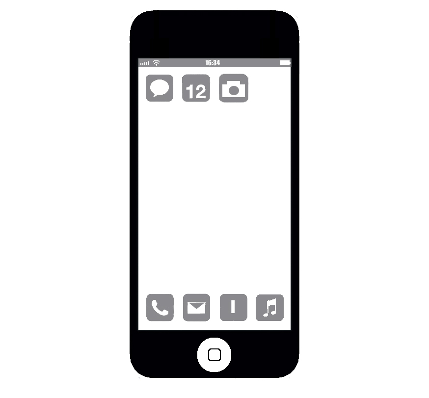 Schema eines iPhones